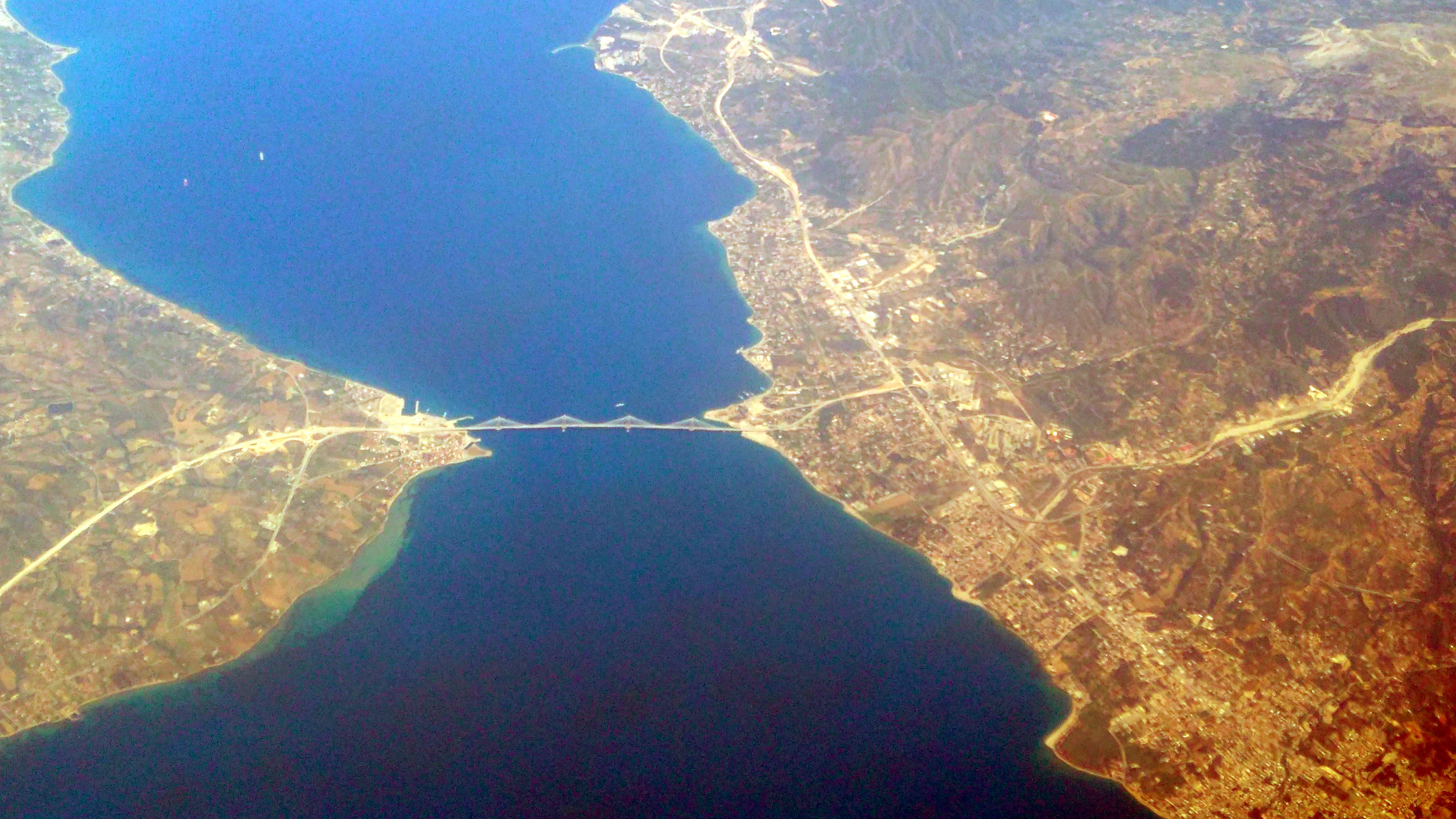 Αεροφωτογραφία Γέφυρα Ρίο-Αντίρριο